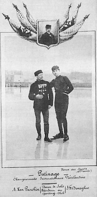 Championnats internationaux de patinage sur glace des Pays-Bas (G. Baron A. Van Panshin, D. J.F. Donoghue (janvier 1889).